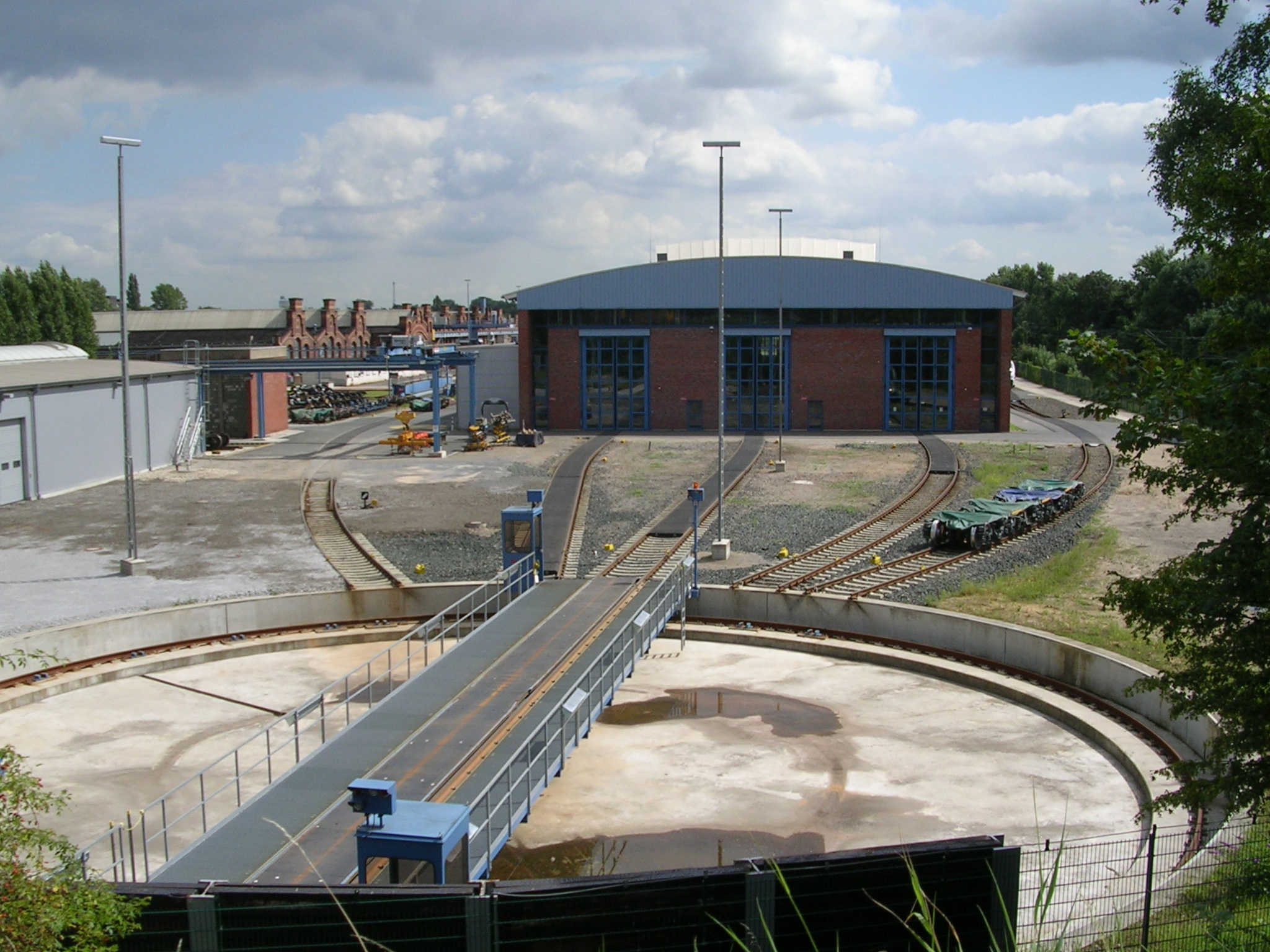 Krefeld-Oppum (North Rhine-Westphalia, Germany): ICE-Instandhaltungswerk Krefeld